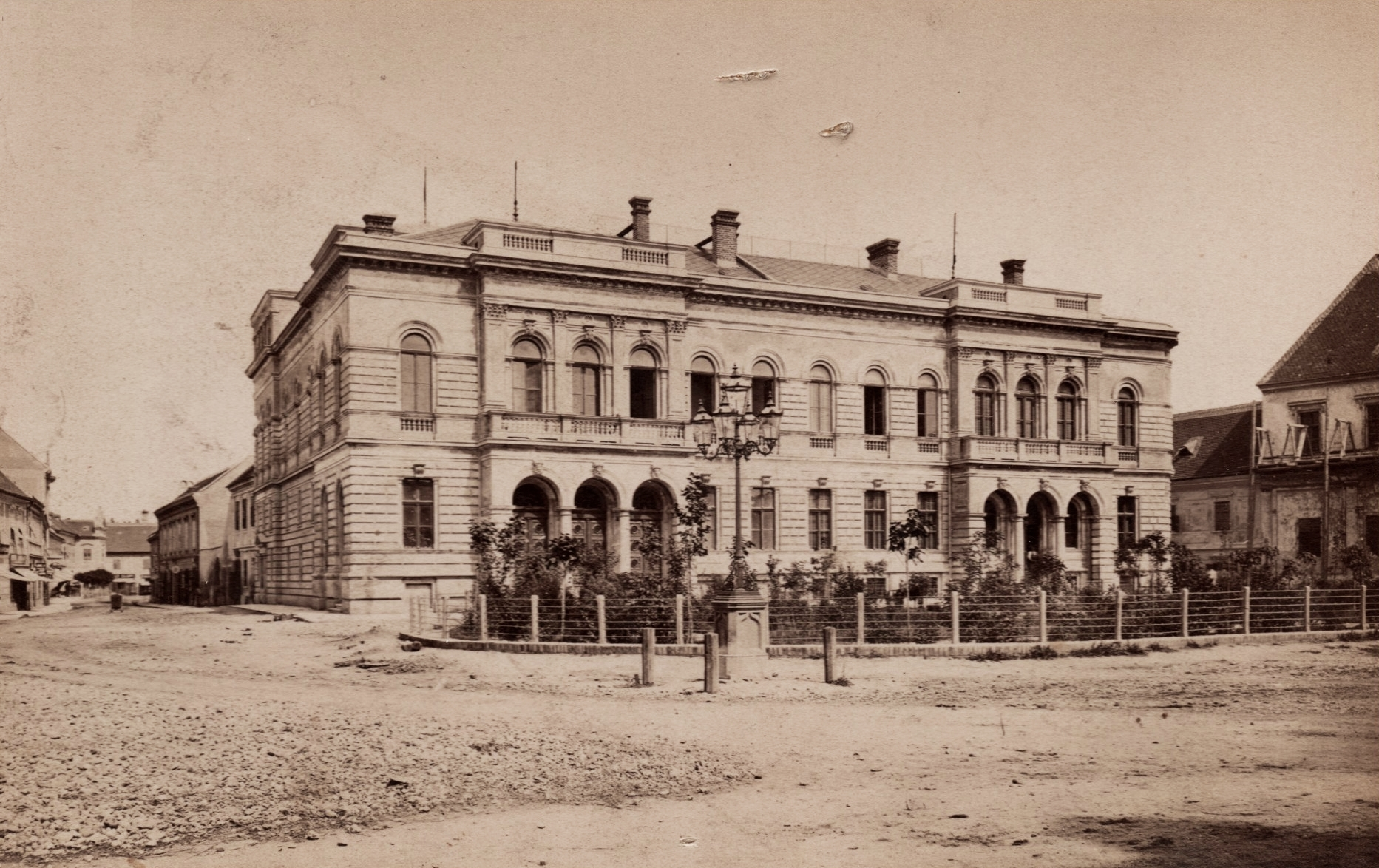 Berzsenyi Dániel (Széchenyi) tér, a Vas Megyei Nemzeti Színház az 1880-as nyitást követően. Location: Hungary, Szombathely Tags: public building, theater, lamp post, street view Title: Berzsenyi Dániel (Széchenyi) tér, a Vas Megyei Nemzeti Színház az 1880-as nyitást követően.